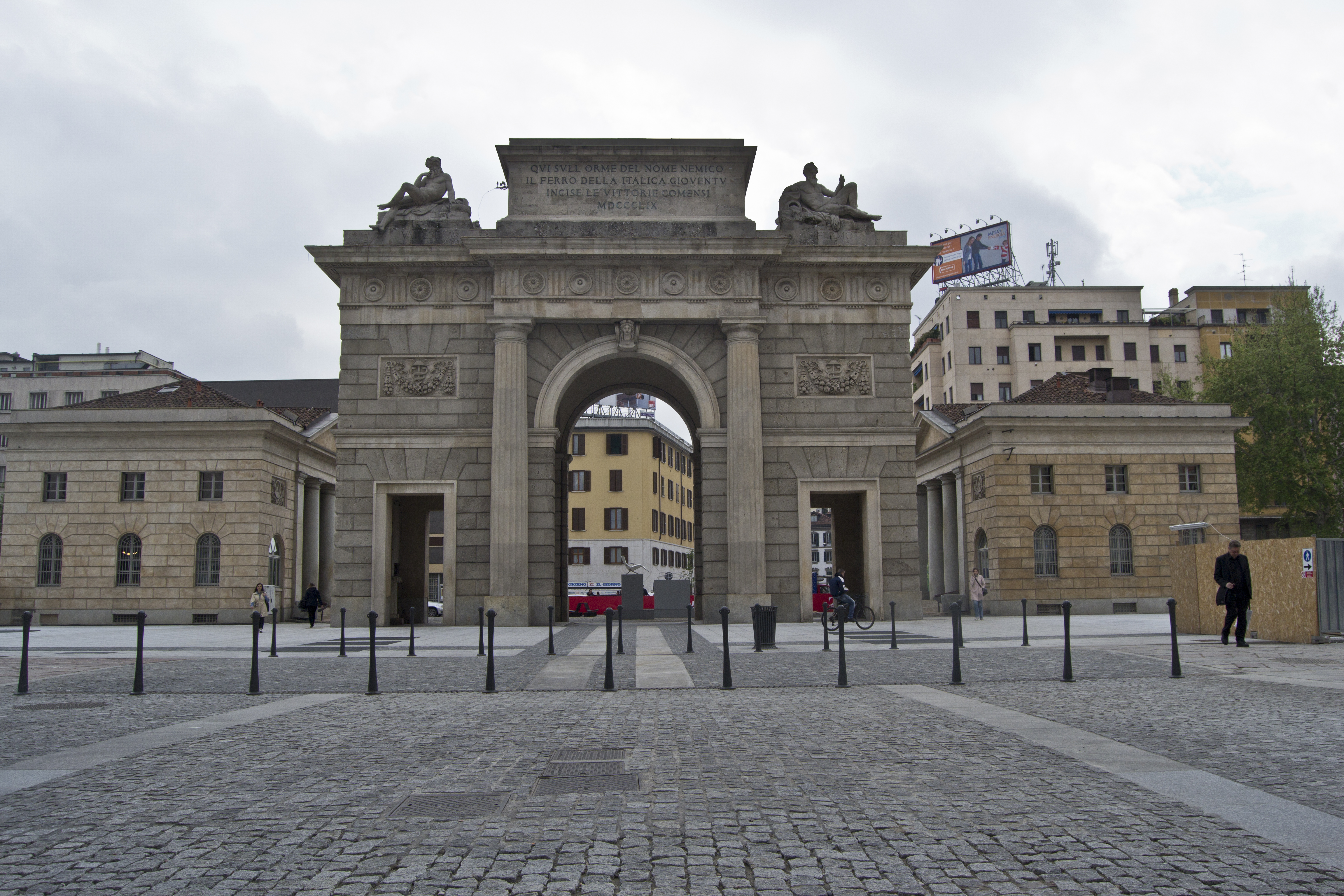 Piazza XXV Aprile, Porta Garibaldi, Milano